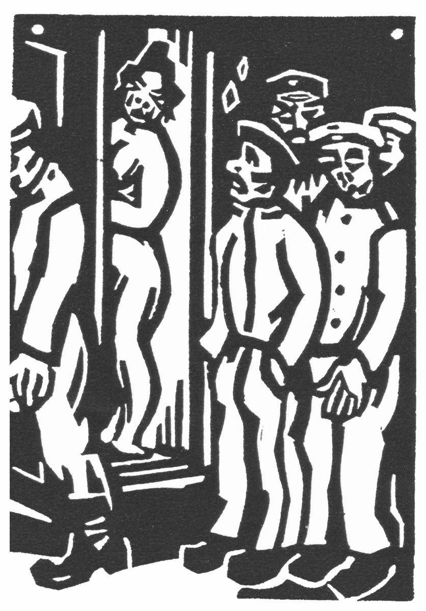 Rüdiger Berlit: Linolschnitt von 1924 aus dem Buch Es lebe der Krieg! von Bruno Vogel, das in Teilen verboten wurde (auch dieses Bild)